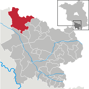 Schönewalde in Brandenburg (Country) - District Elbe-Elster